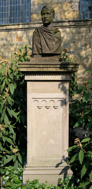 Waldbröl - 17.03.1863 the monument was established (for Prussia king Friedrich Wilhelm III in front of the Protestant church. The monument donated circle Waldbröl on the occasion of the 50th anniversary of the elevation of the Prussian state. The inscription is: Dem Könige Friedrich Wilhelm III. der Kreis Waldbröl - 17.3.1863 - Waldbröl - 17.03.1863 wurde das Denkmal für den Preußen König Friedrich Wilhelm III. an der evangelischen Kirche errichtet. Das Denkmal stiftete der Kreis Waldbröl aus Anlass des 50. Jahrestages der Erhebung des preussischen Staates. Die Inschrift lautet: Dem Könige Friedrich Wilhelm III. der Kreis Waldbröl - 17.3.1863 Author mrfinch Time of creation 16 04 2005 Licence GNU FDL and CC-by-SA Camera Canon S 45